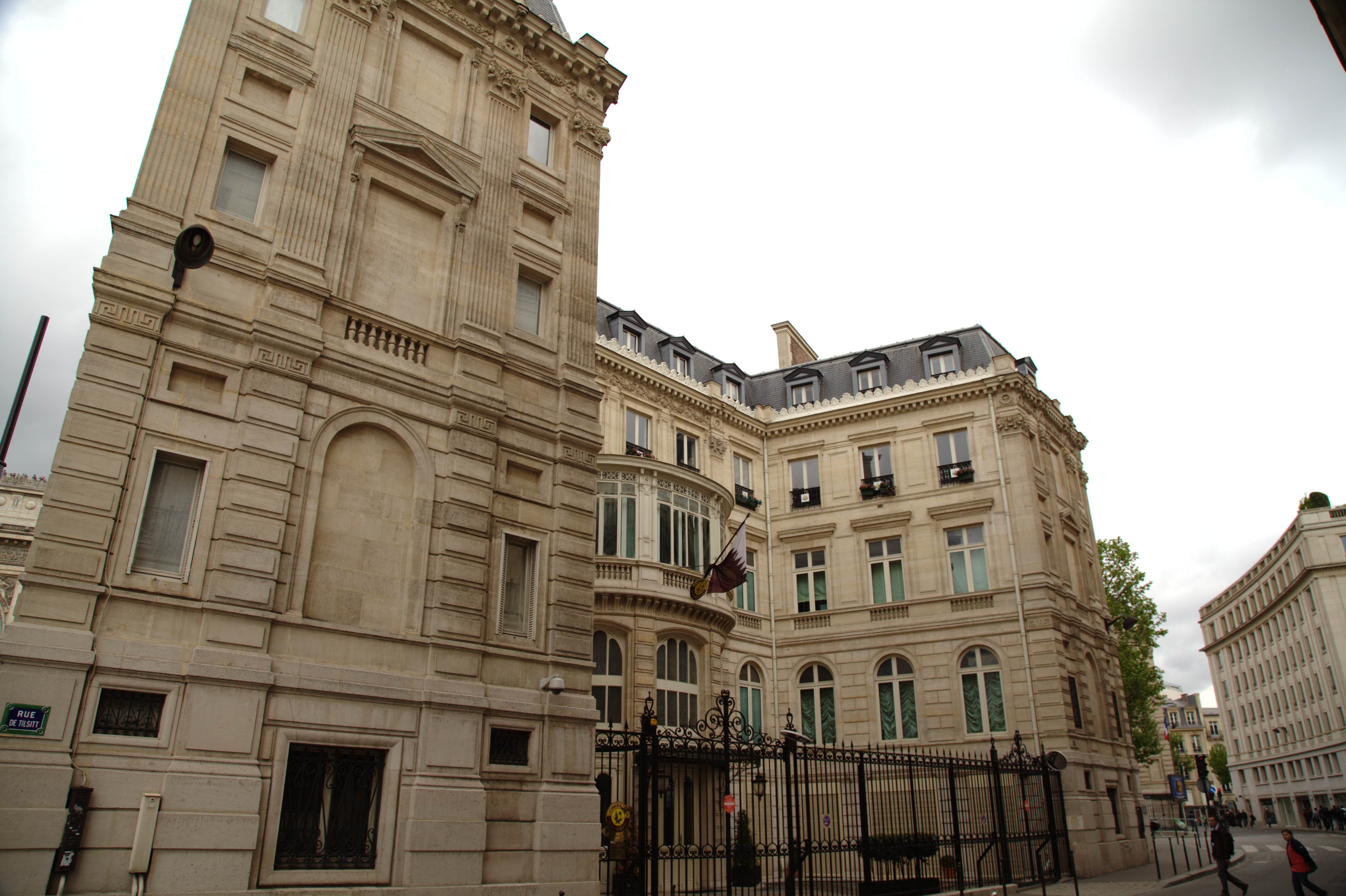 L'hôtel Landolfo-Carcano à Paris, vue depuis la rue de Tilsitt au coin avec l'avenue des Champs-Élysées